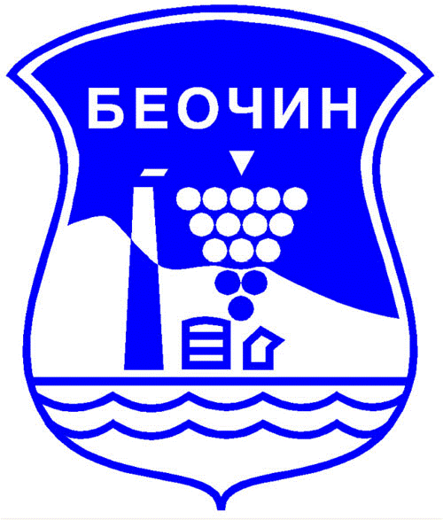 Blason de la ville de Beočin en Serbie, Voïvodine